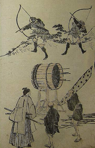 『北斎漫画』第六編（文化14年）葛飾北斎著から。From Hokusai Manga volume 6 (1817).